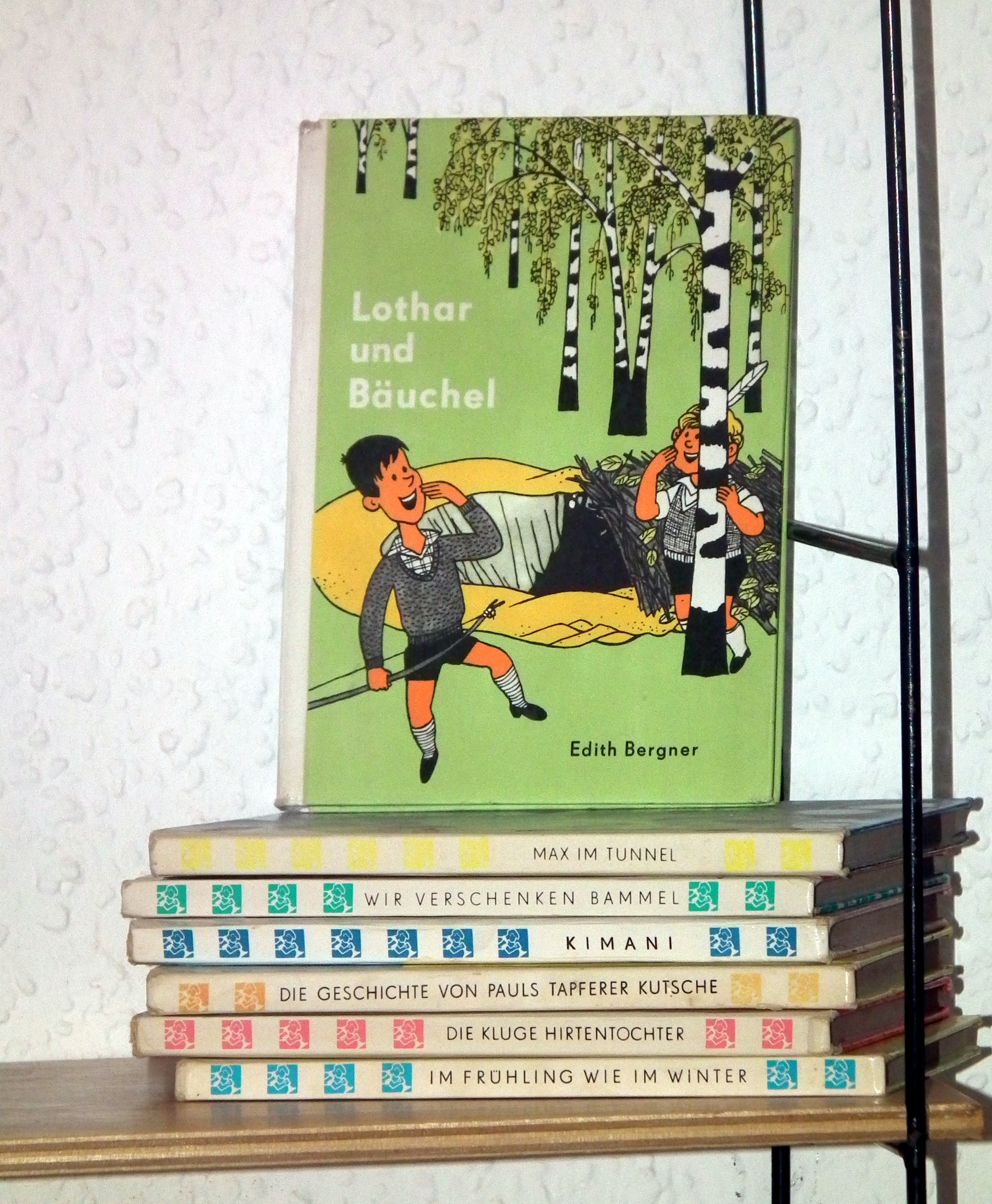 Die kleinen Trompeterbücher, Veröffentlicht mit Genehmigung der Museumsleitung